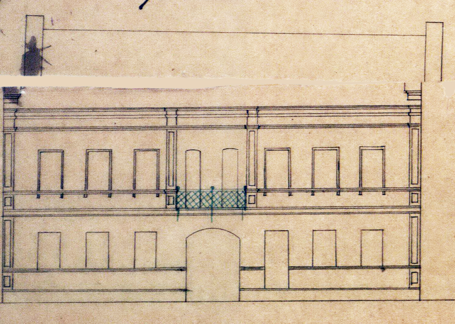 Беларуская (тарашкевіца): Менск (Miensk), вуліца Койданаўская (vulica Kojdanaŭskaja). Дом Поляка (Polak)